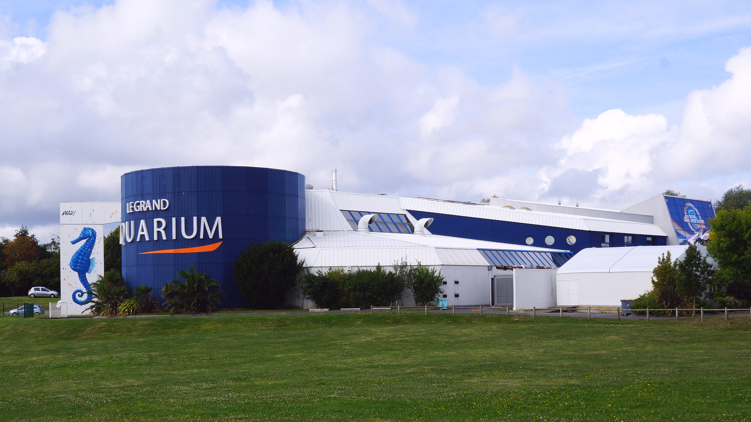 Le Grand Aquarium de Saint-Malo France Frankreich Foto 2017 Wolfgang Pehlemann DSC05185